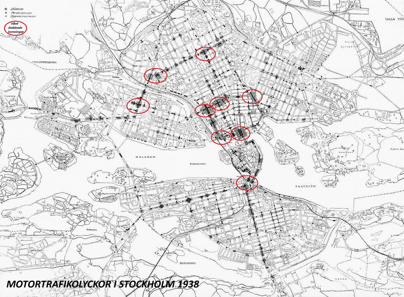 Karta över motortrafikolyckor i Stockholm 1938, bearbetat och förtydligat av User:Holger.Ellgaard